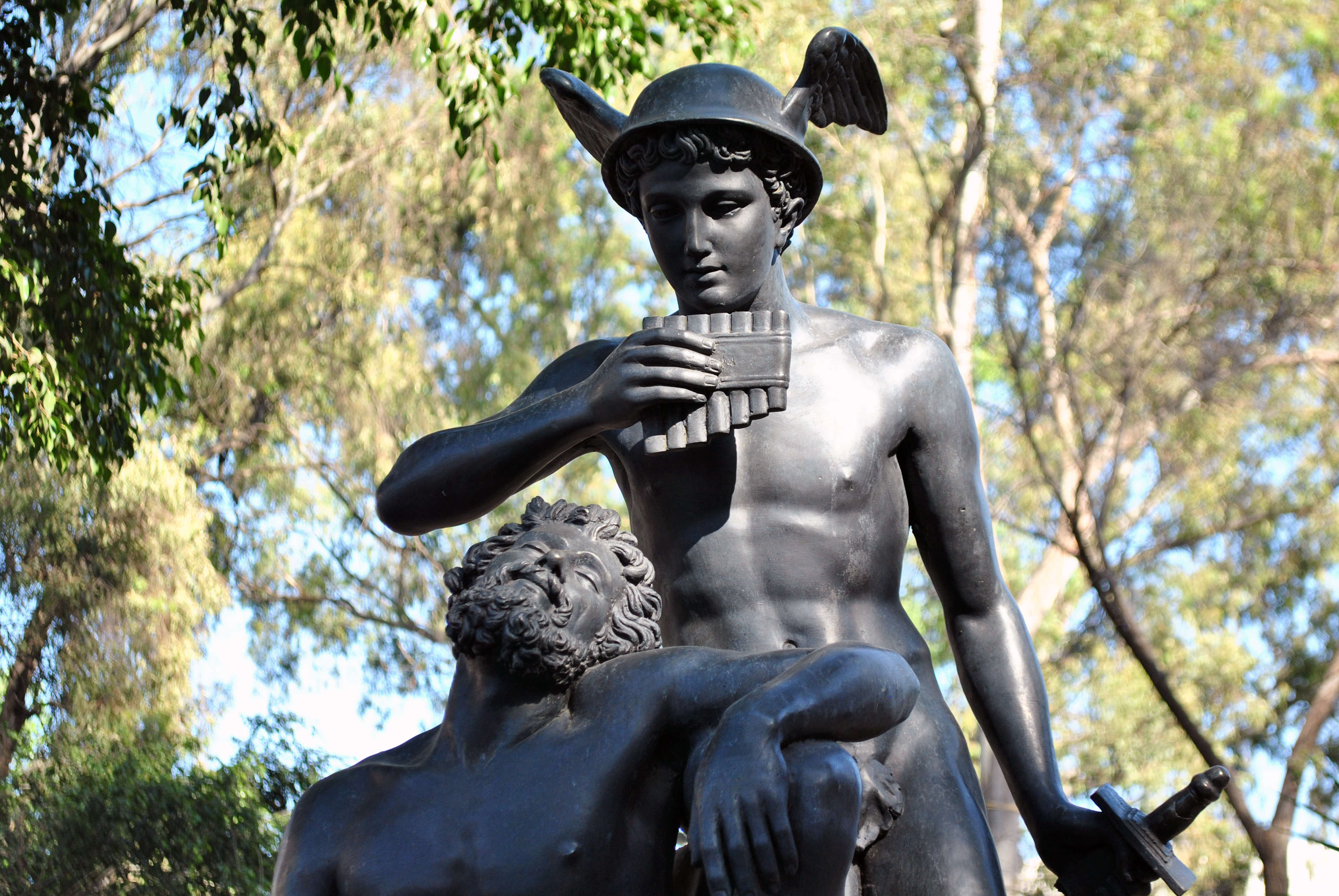 Mercurio y Argos, de Felipe Sojo, siglo XIX. Avenida Álvaro Obregón, Colonia Roma, Ciudad de México.